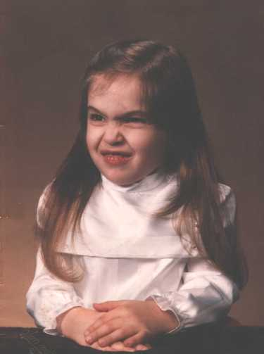 Inho.